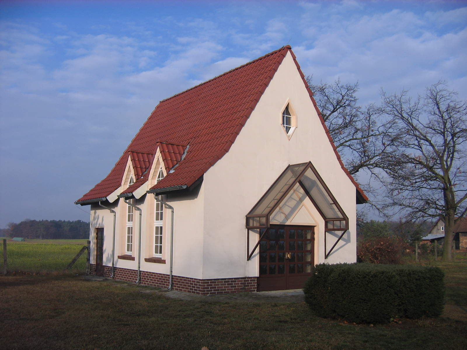 Kapelle auf dem Schlichower Friedhof